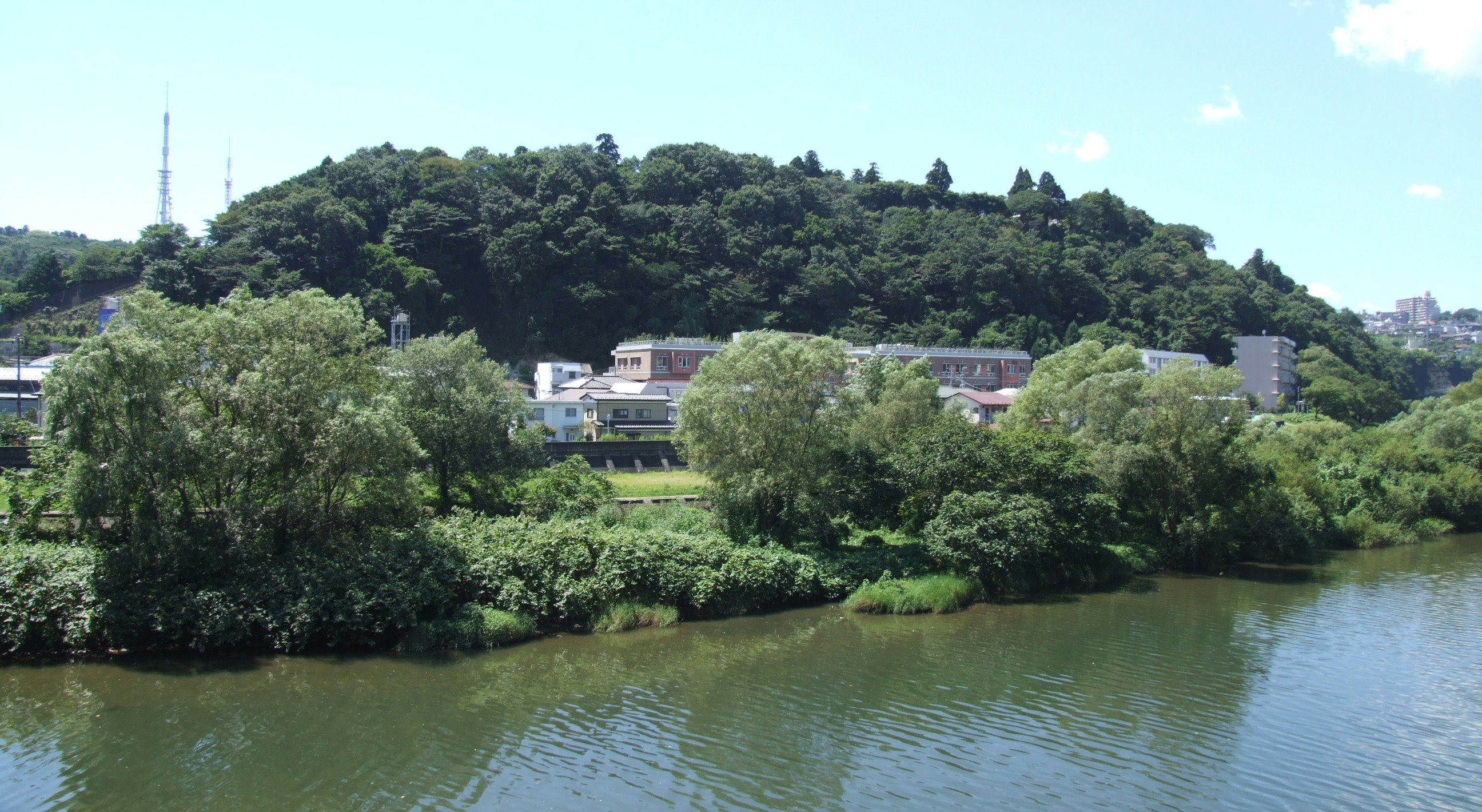 Mt. Atago